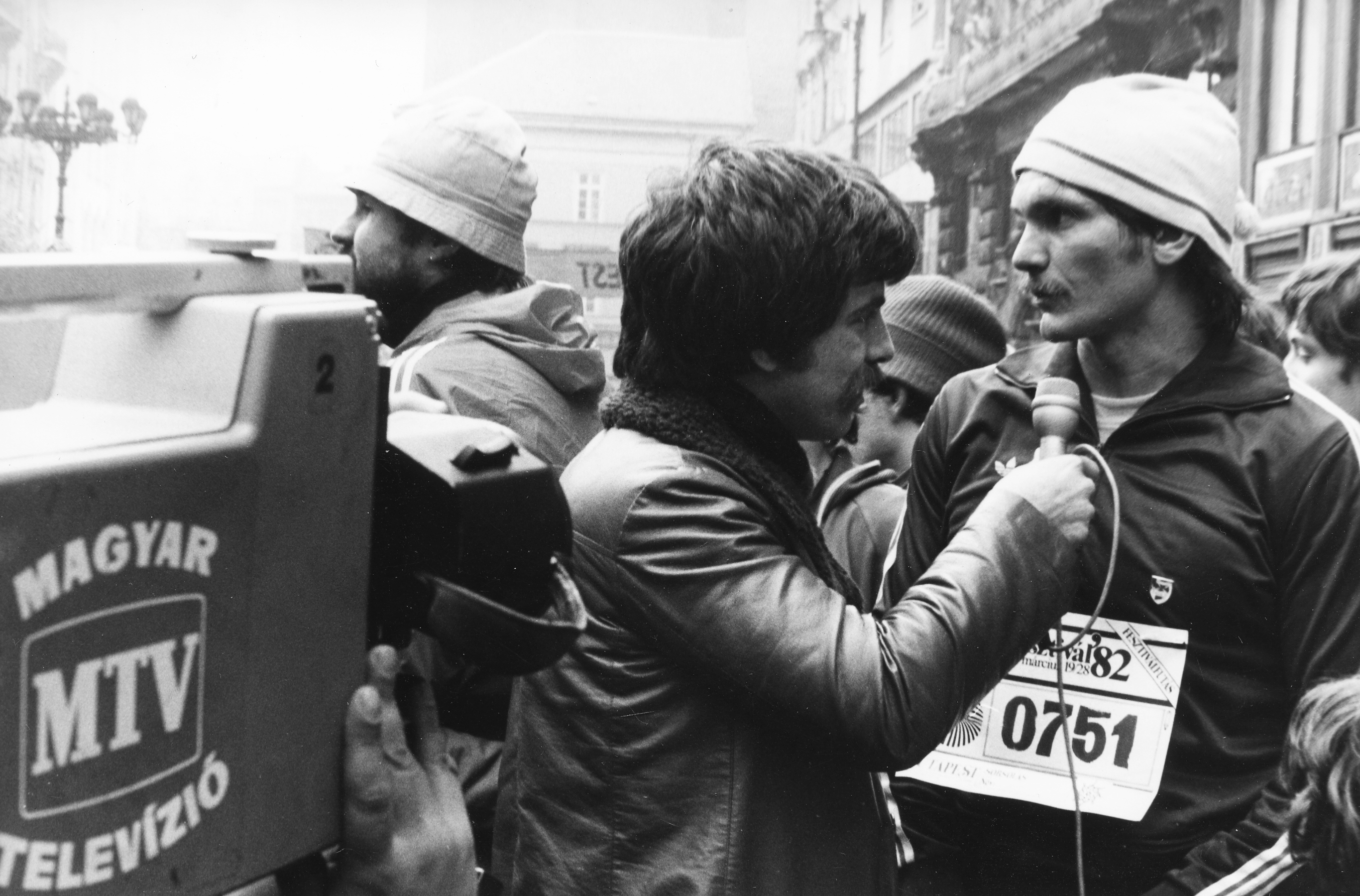 Vörösmarty tér a Harmincad utca felé nézve. "Futapest" futóverseny, az MTV riportere Déri János és Wichmann Tamás világbajnok kenus. Location: Hungary, Budapest V. Tags: Budapest Title: Vörösmarty tér a Harmincad utca felé nézve. \